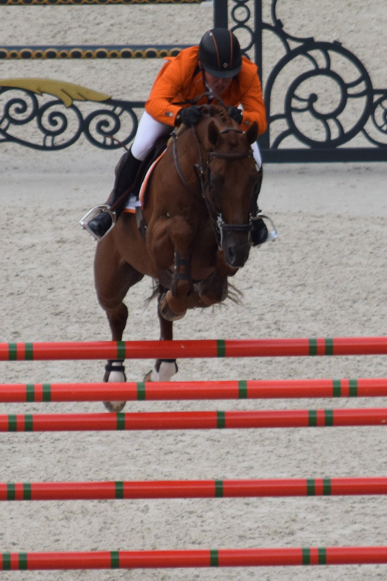 JEM 2014 : Gerco Schröder et Glock's London N.O.P. en saut d'obstacles